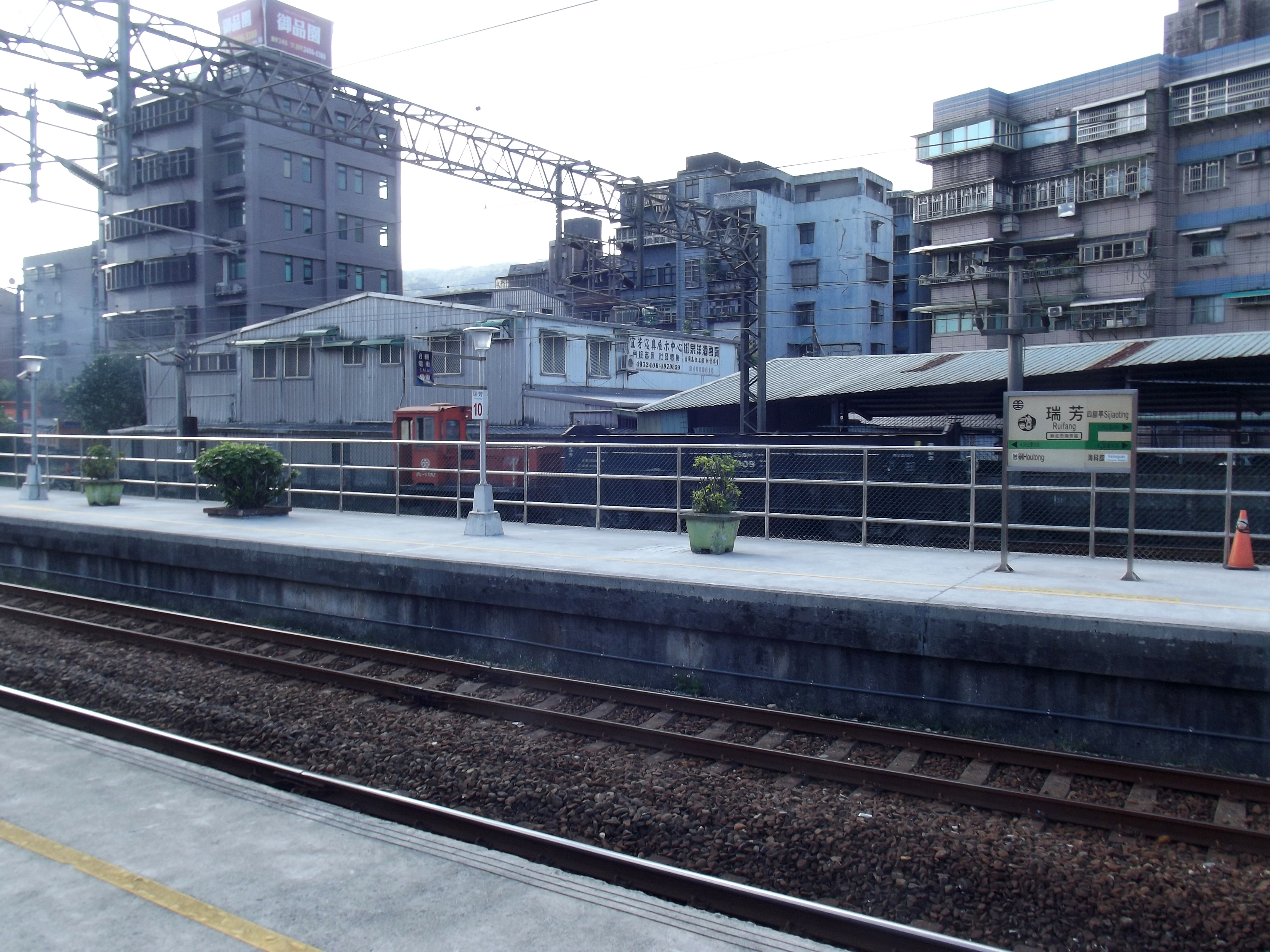 中文（台灣）: 臺灣鐵路管理局貨車移動機DL-1102與石斗車，停靠瑞芳車站。